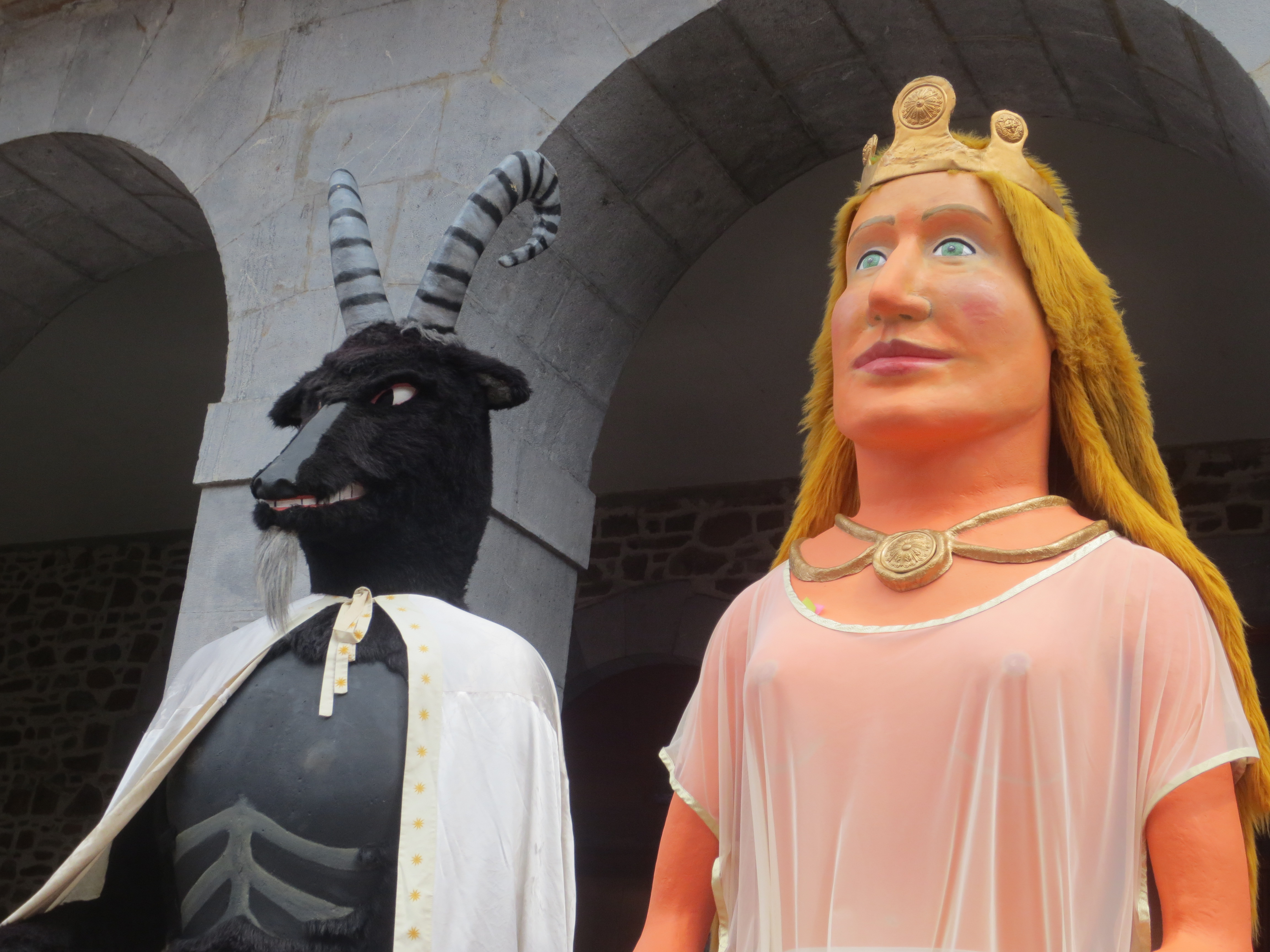 Akerbeltz eta Mari erraldoiak Areatzako udaletxearen aurrean.